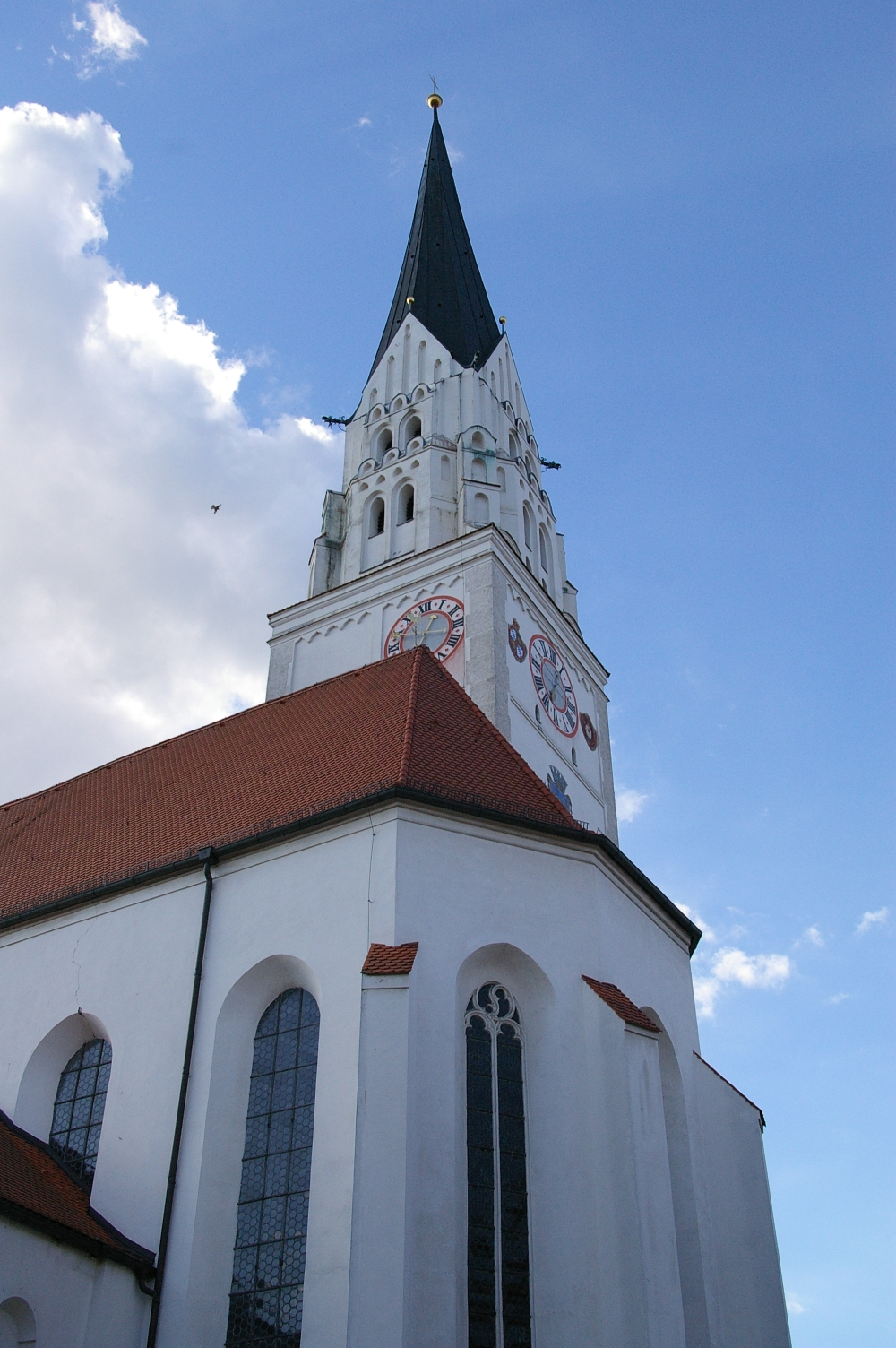 Pfaffenhofen a. d. Ilm, St. Johannes Baptist im Juli 2005.